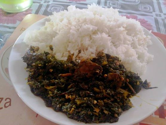 sauce faite à base de feuille de patate douce qui s'accom avec du riz